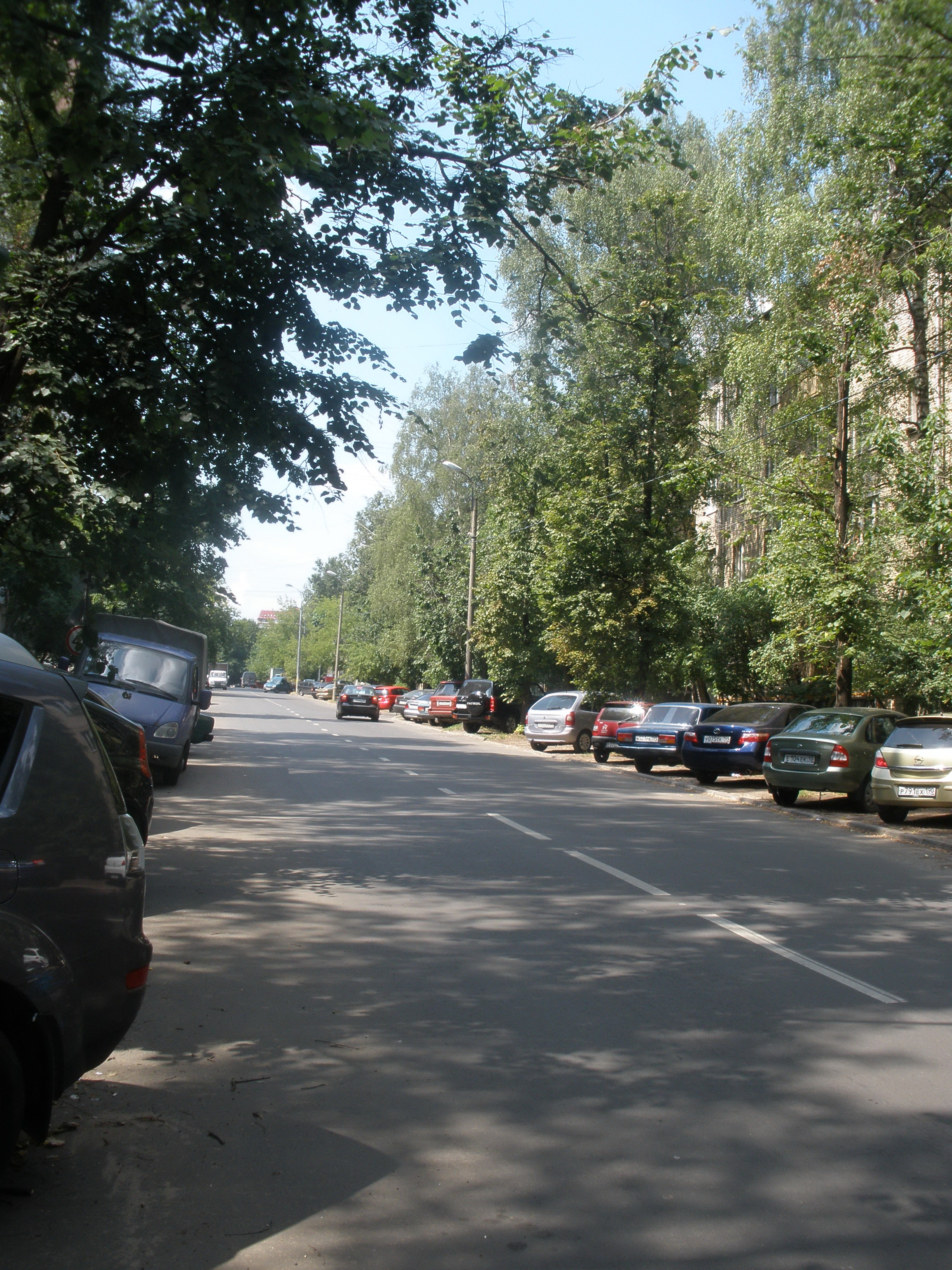 Москва, ул. Ватутина